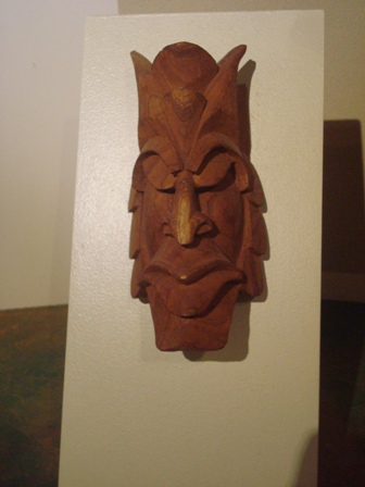 Máscara boruca de madera de balsa. Museo del Oro Precolombino, San José de Costa Rica.